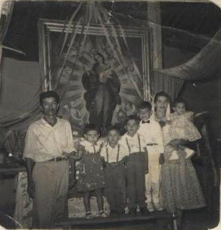 En la fotografia aparece la imagen de la Virgen de la canoa, patrona de Beltran Cundinamarca, Colombia, junto a una familia del municipio. La fotografia fue tomada en la decada del sesenta.